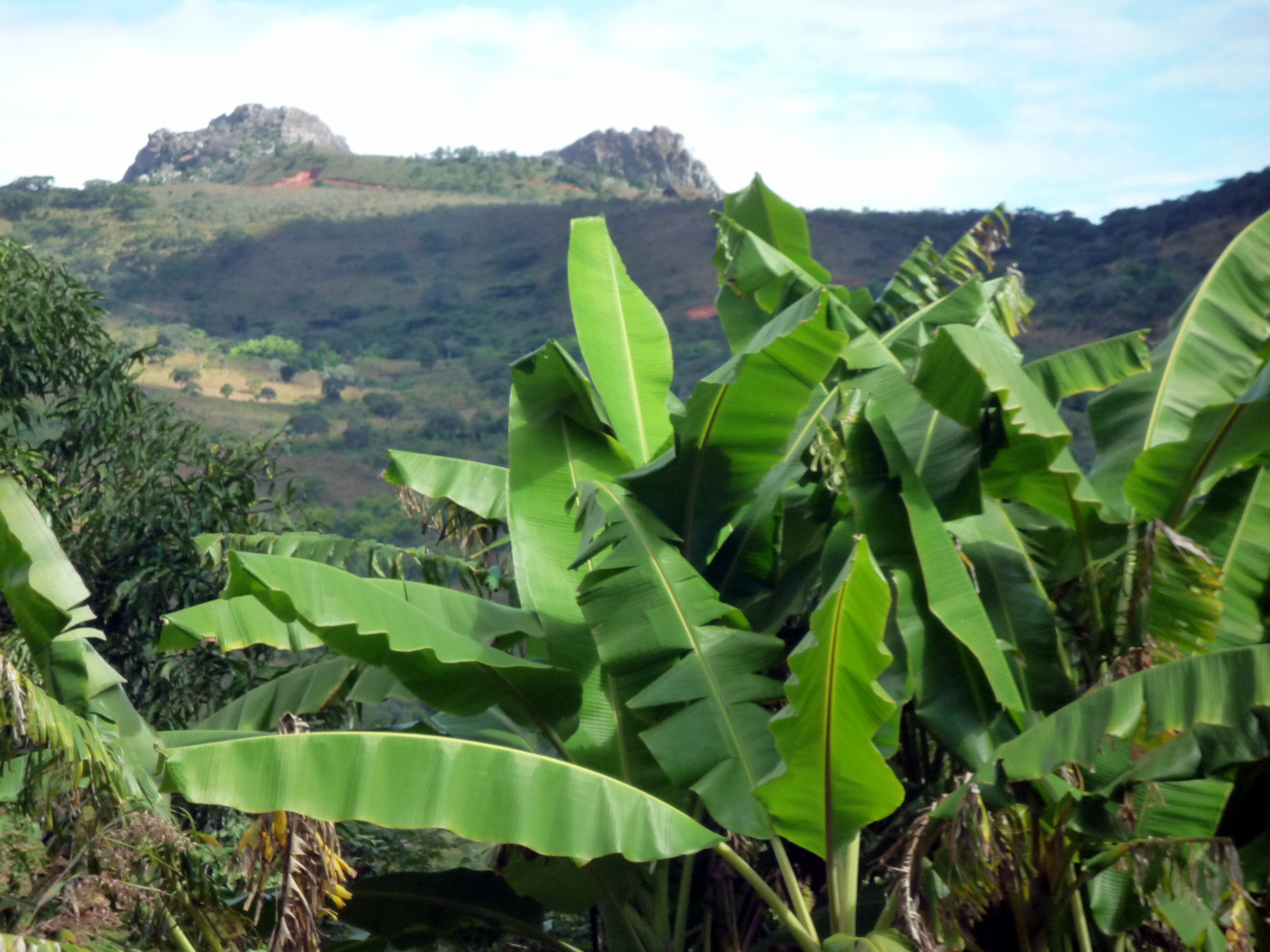 Eisen Berg Liganga im Ludewa District , Njombe Region, Tansania